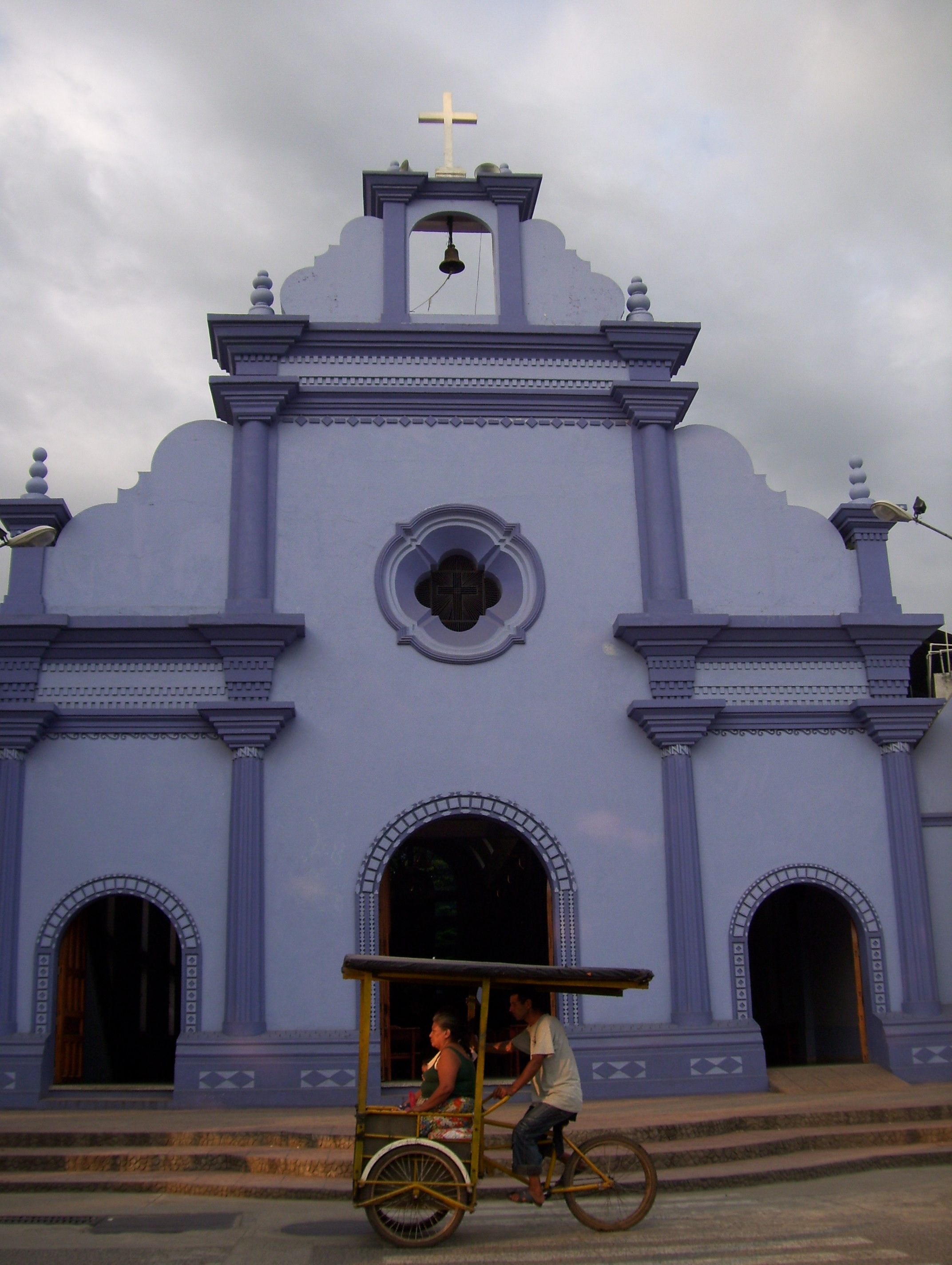 Ciudad fronteriza de Tecún Umán, frontera con México (Ciudad Hidalgo (Chiapas))